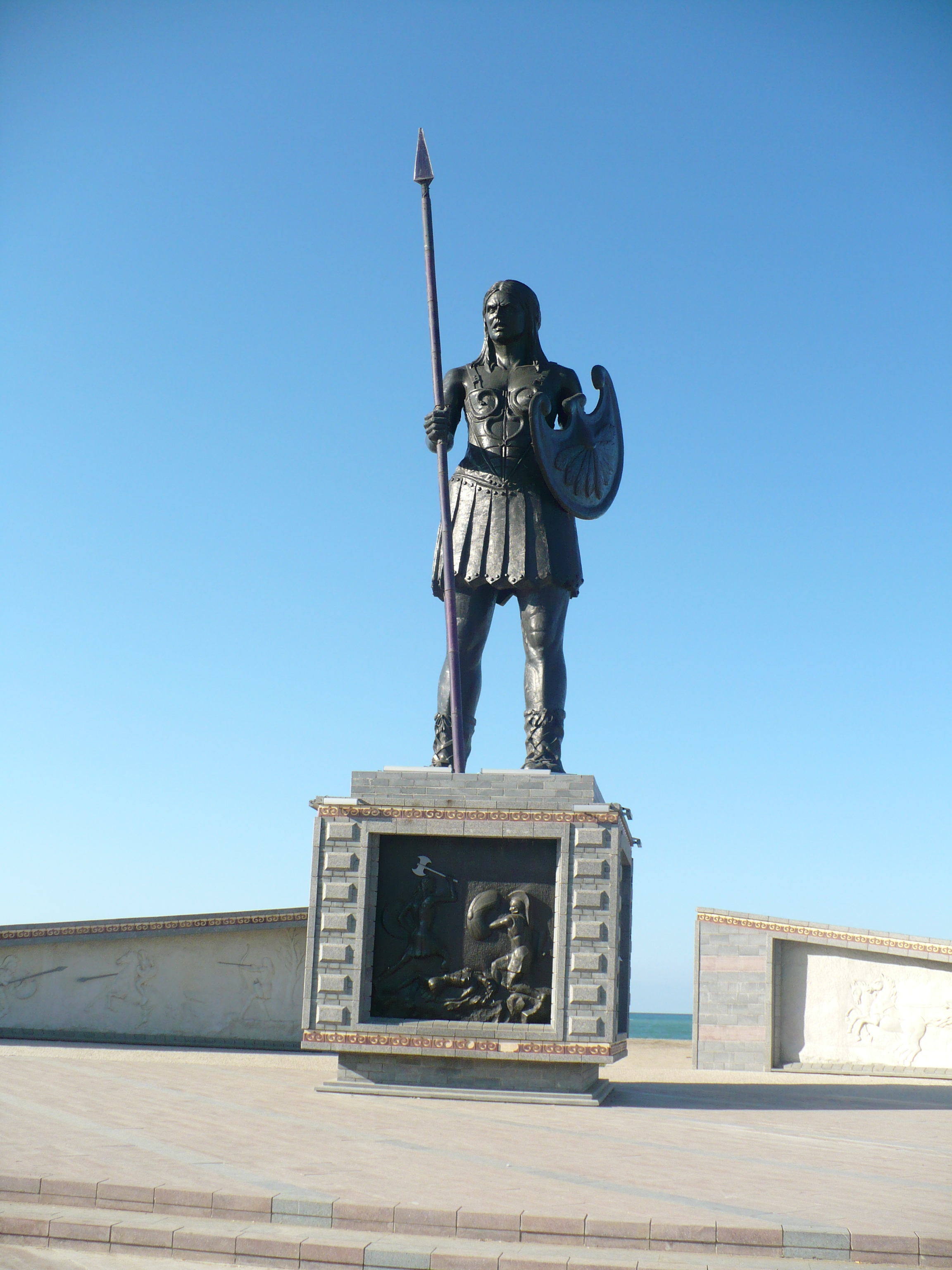 Samsun'da Amazon heykeli